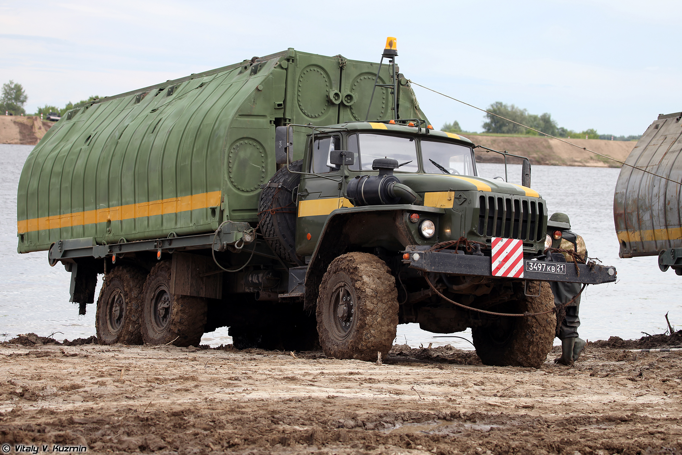 Подготовка к развертыванию понтонно-мостового парка ПМП на шасси Урал-4320 (PMP floating bridge on Ural-4320 chassis)